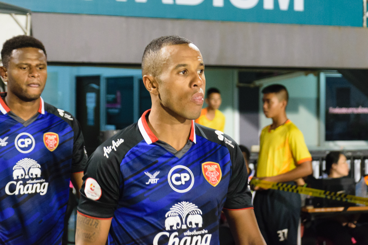 Michaël N'dri